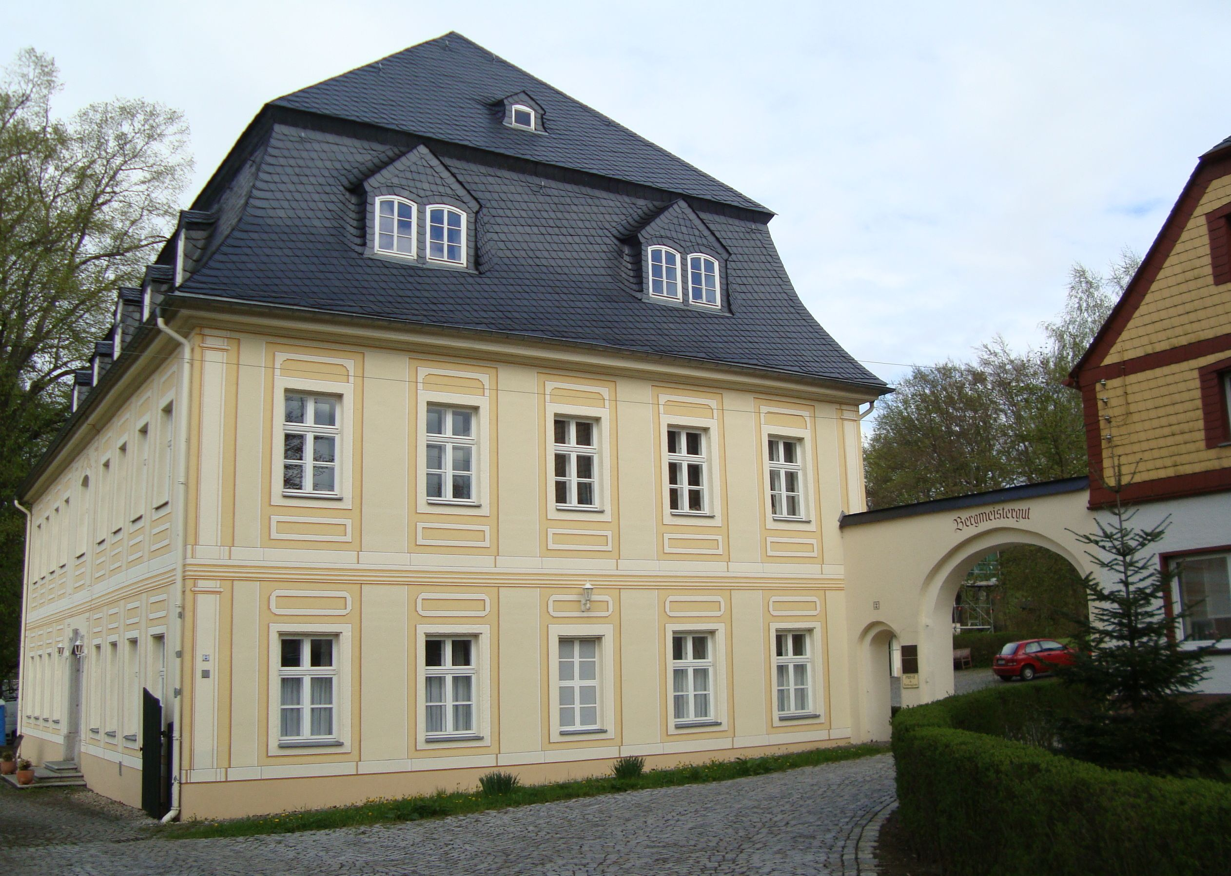 Bergmeistergut in Niederzwönitz im Erzgebirge